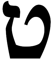 hebrew letter tet